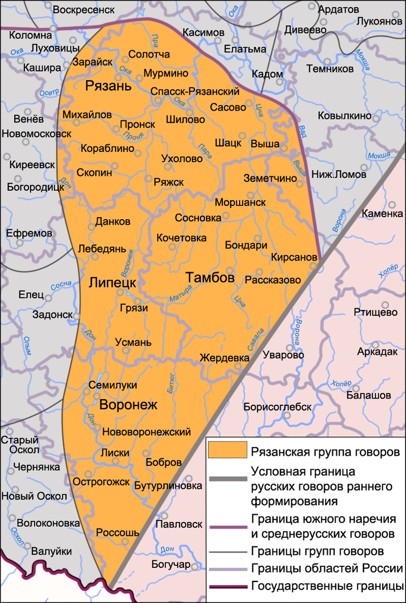 Карта Рязанской группы говоров. Источники: Захарова К. Ф., Орлова В. Г. Диалектное членение русского языка — 2-е изд. — М.: Едиториал УРСС, 2004. — ISBN 5-354-00917-0, с. 166. Касаткин Л. Л. Русские диалекты. Лингвистическая география Русские. Монография Института этнологии и антропологии РАН — М.: Наука, 1999, с. 96. Федеральная целевая программа Русский язык. Региональный центр НИТ ПетрГУ